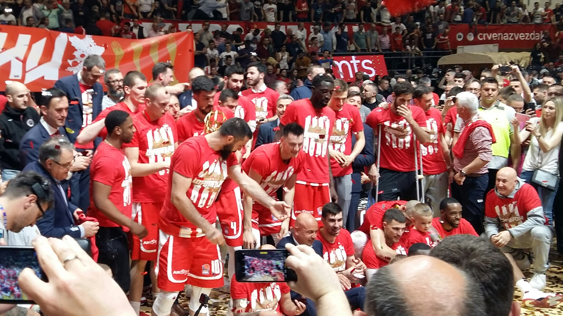 КК Црвена звезда шампион АБА лиге